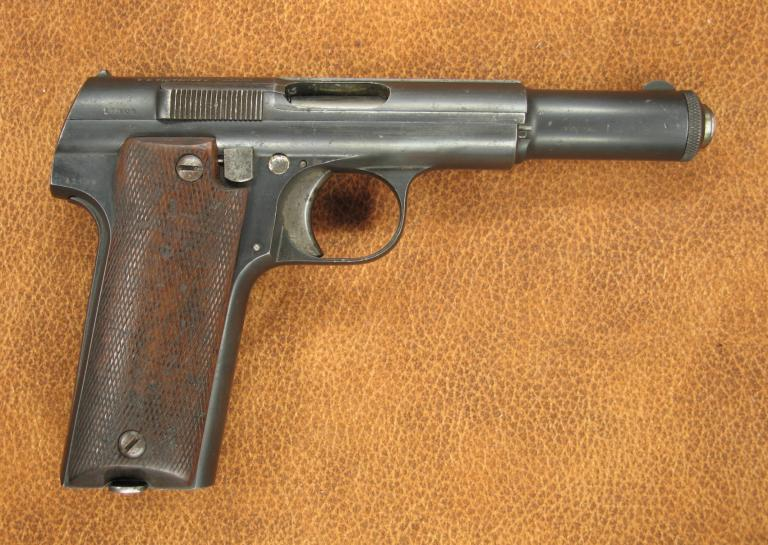 Pistola ASTRA 600/43 calibre 9mm PARABELLUM